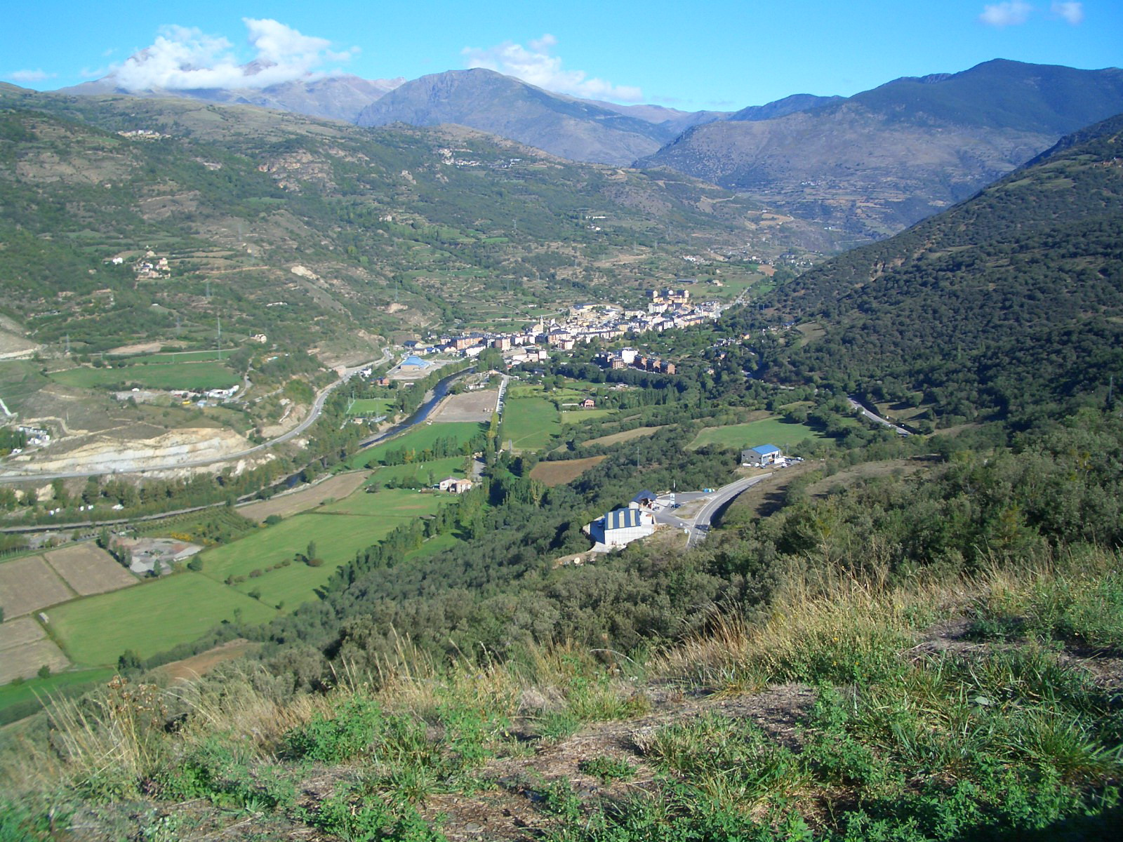 Picture of Sort, Pallars Sobirà, Catalonia